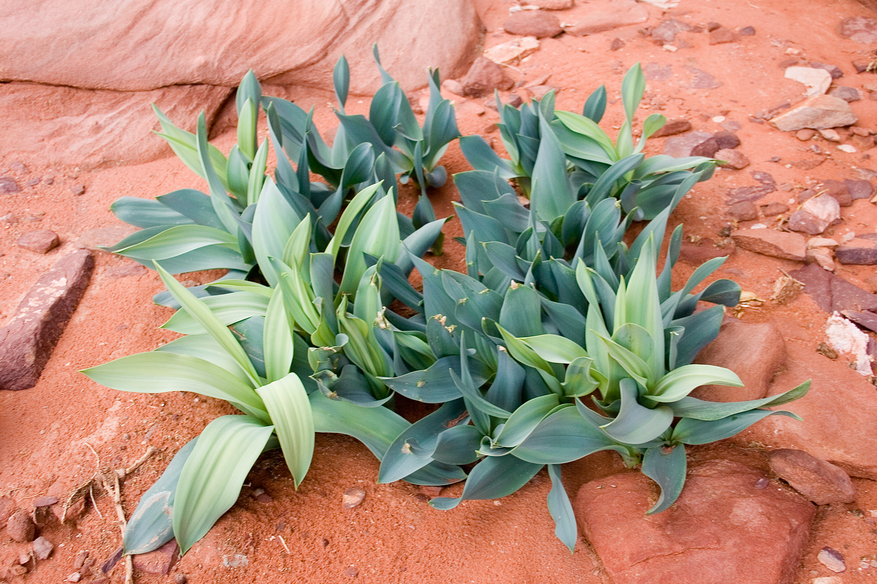 Drimia maritima growing in Jordan's Wadi Rum.